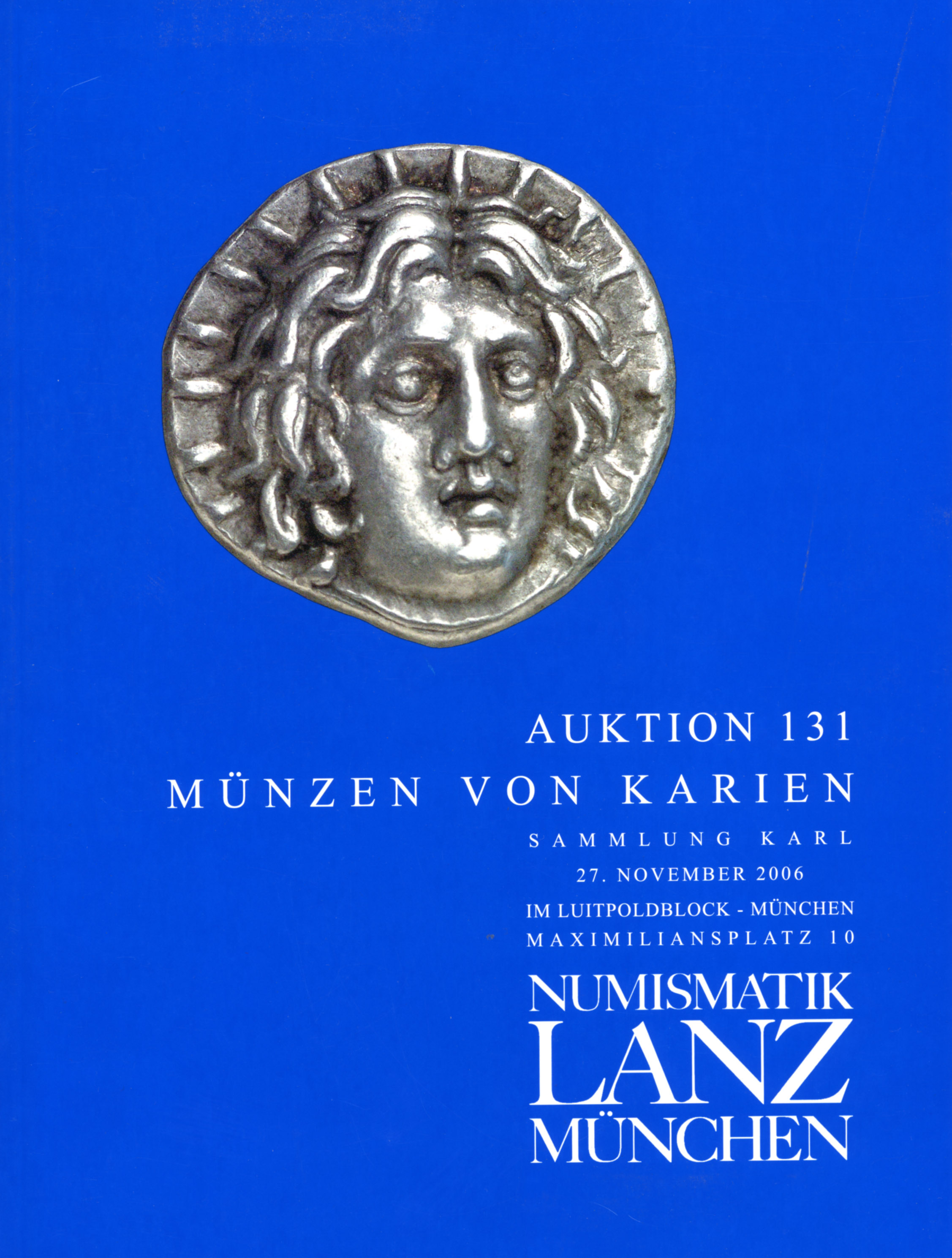 Titelblatt des Auktionskataloges der Sammlung Karl. Numismatik Lanz München, Auktion 131: Münzen von Karien; Sammlung Karl